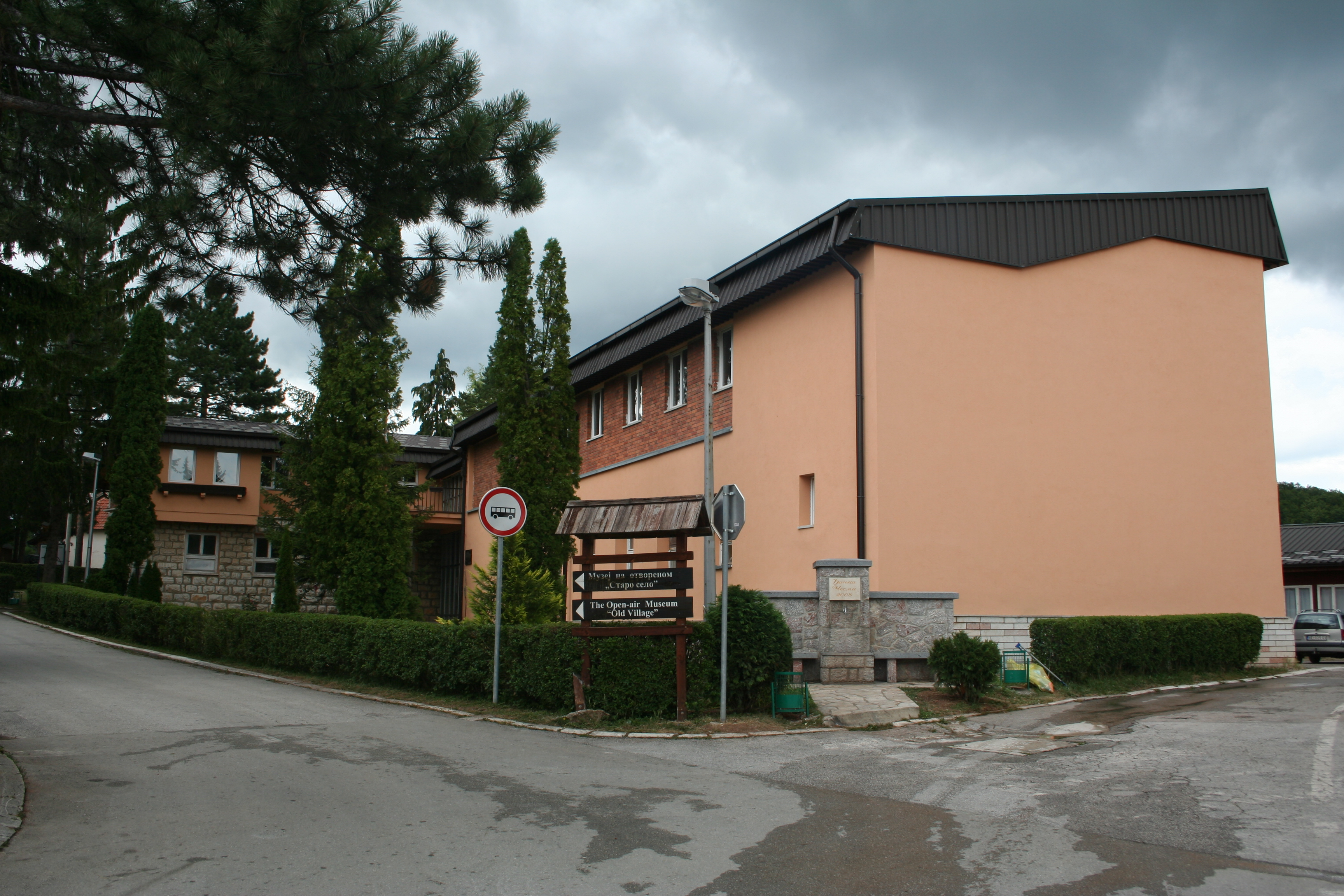 OŠ "Savo Jovanović Sirogojno" Sirogojno